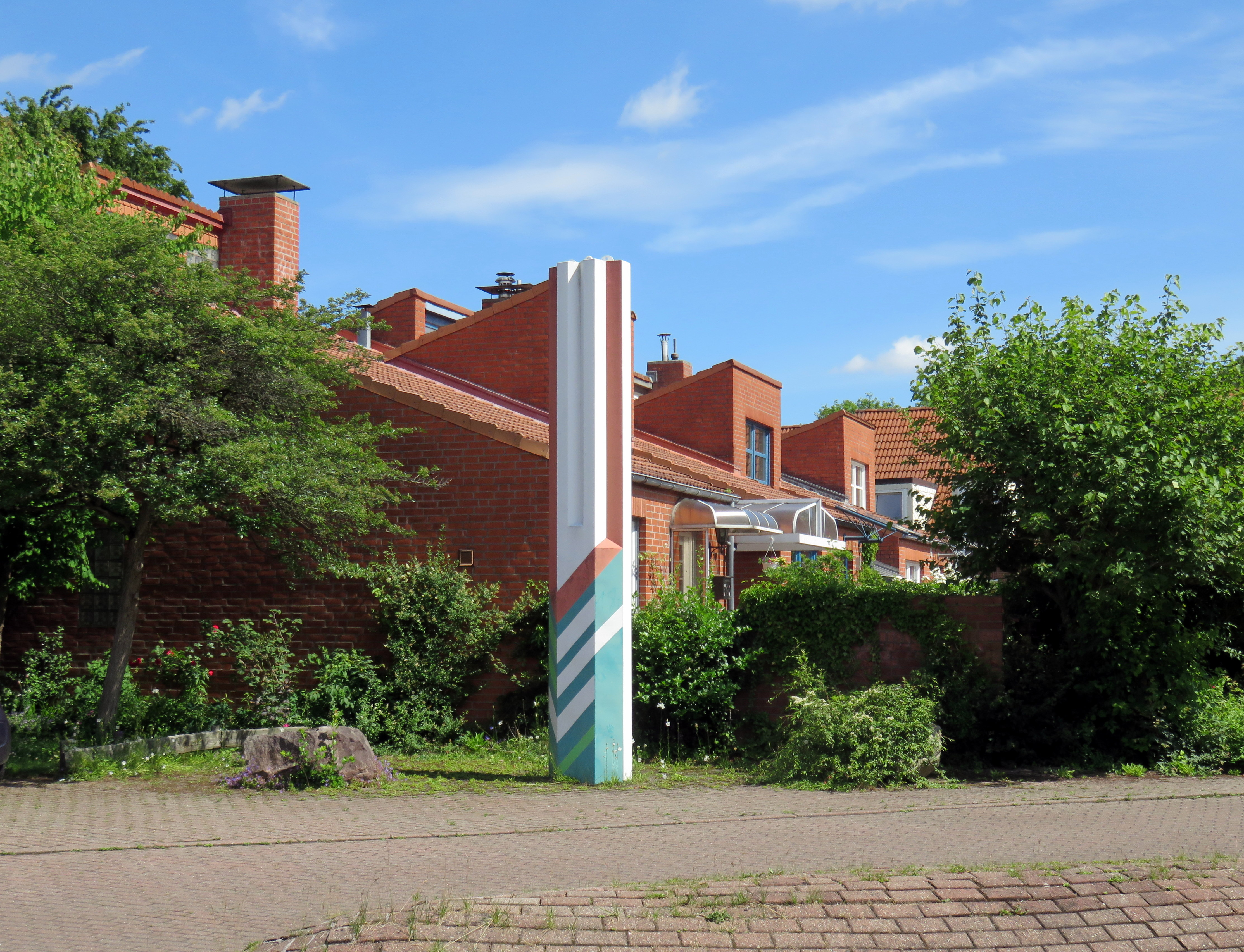 Farbige Stele des deutschen Bildhauers Georg Engst von 1978, Gödersenweg 12, Hamburg-Poppenbüttel.